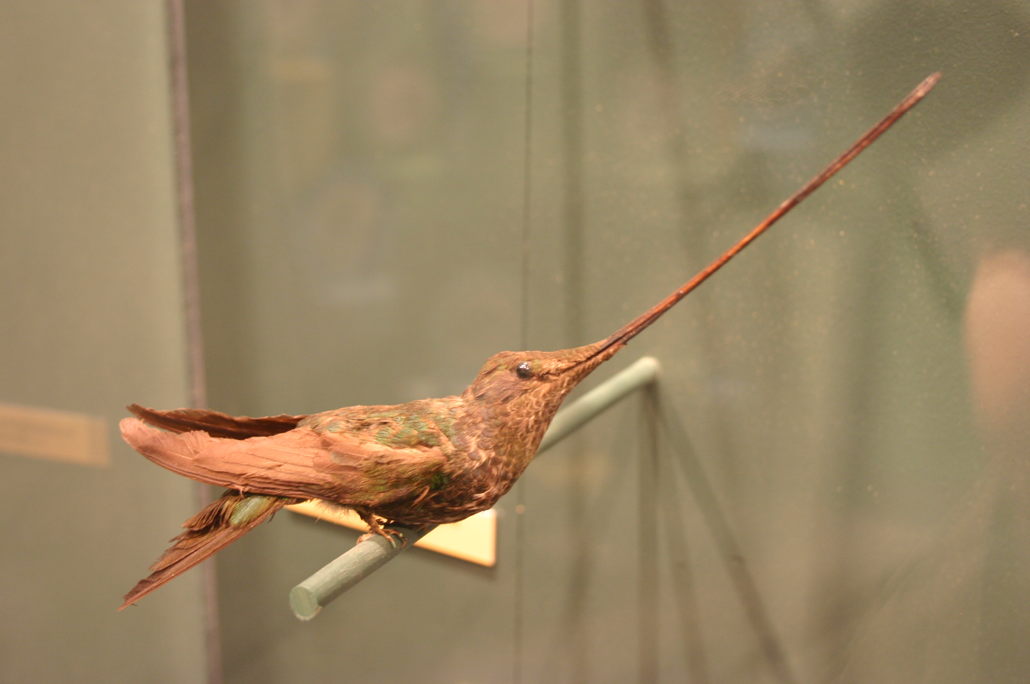 Ensifera ensifera